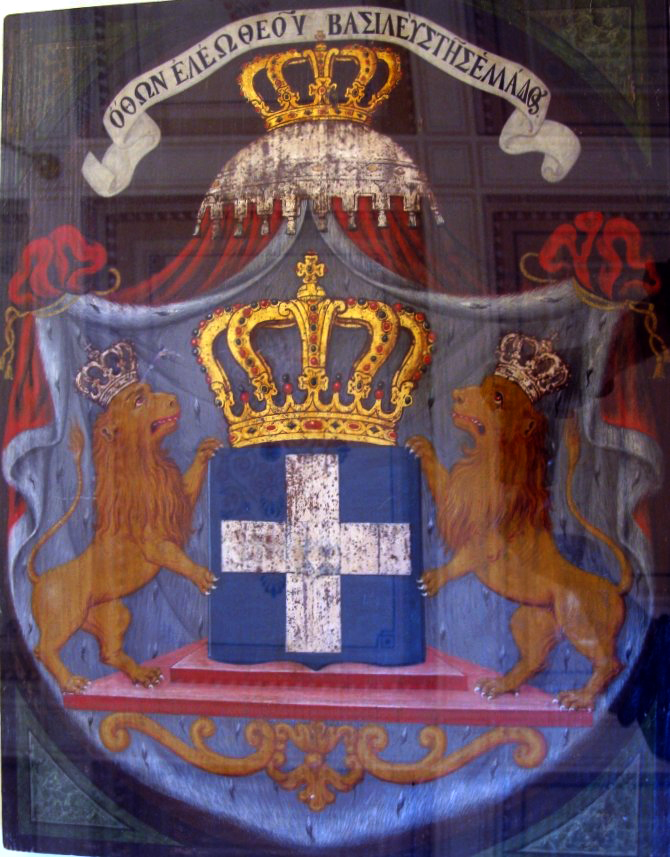 Θυρεός του Όθωνα.